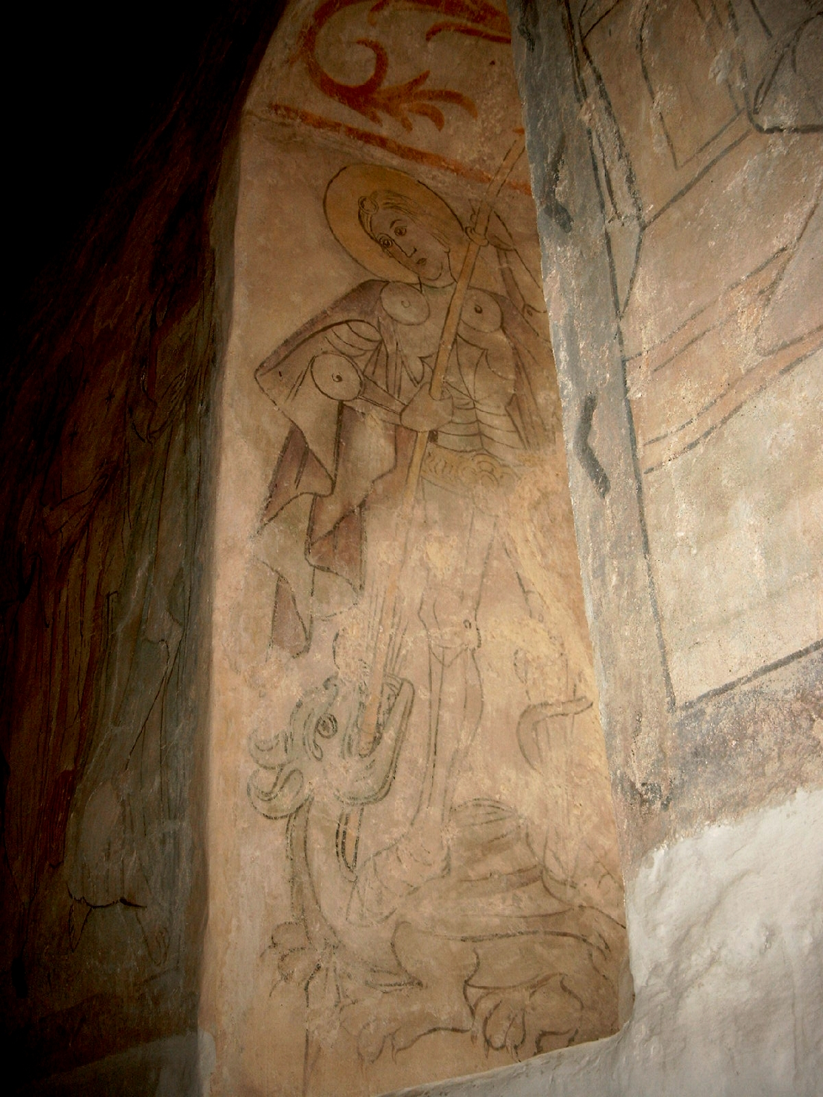 Dorfkirche Görsdorf b. Storkow, Stadt Storkow (Mark), Lkr. Oder-Spree, Brandenburg, Deutschland, Hlg. Georg mit dem Drachen (Zustand Juli 2002)